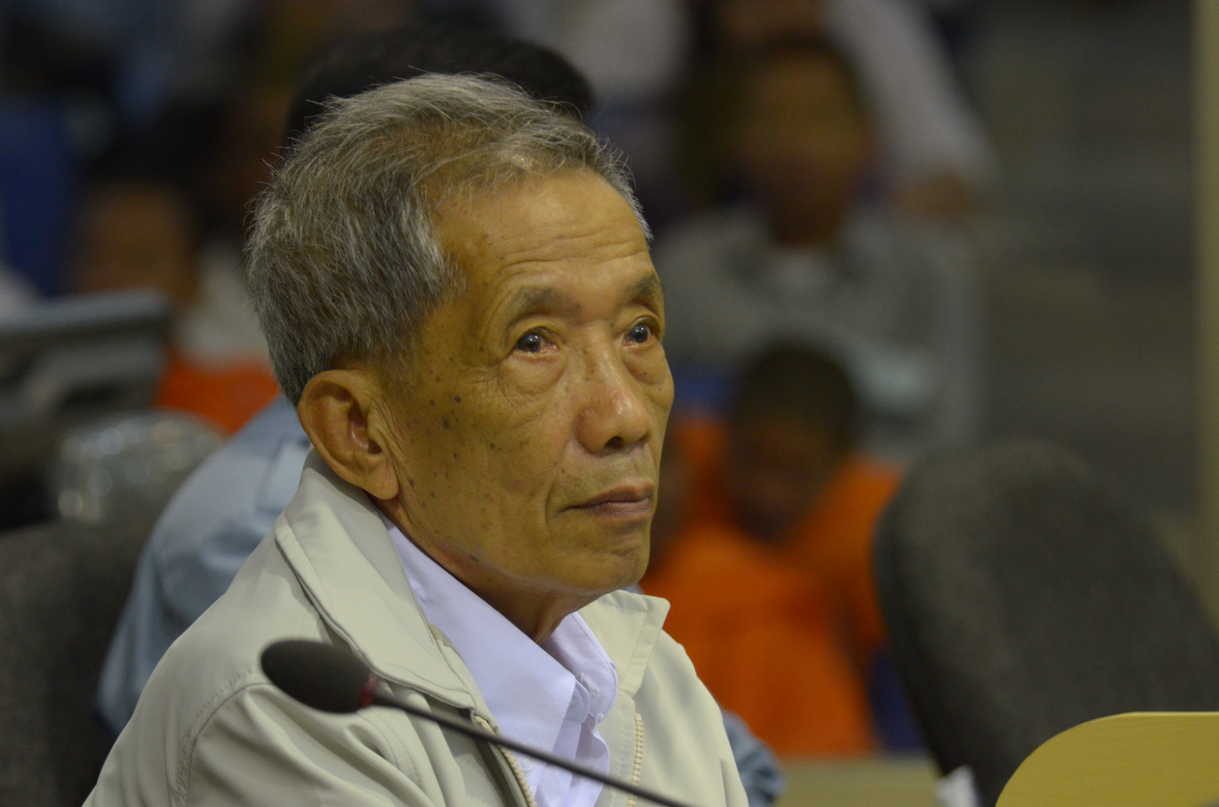 Kang Kek Iew